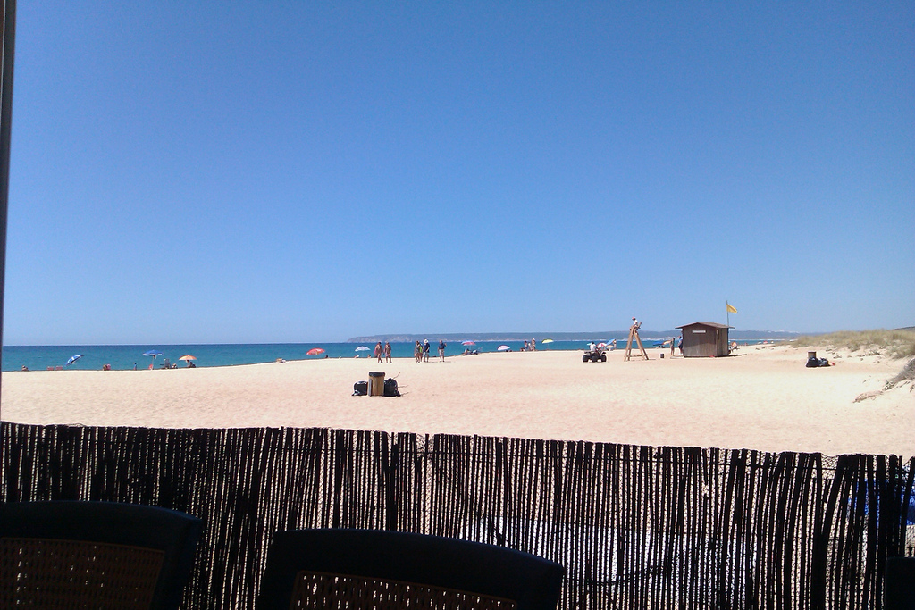 Vista de la playa de Atlanterra con el cabo de Trafalgar al fondo